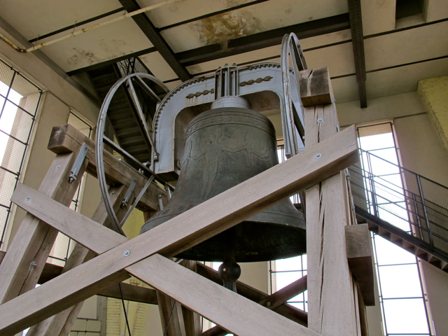 Freiheitsglocke im Rathaus Schöneberg